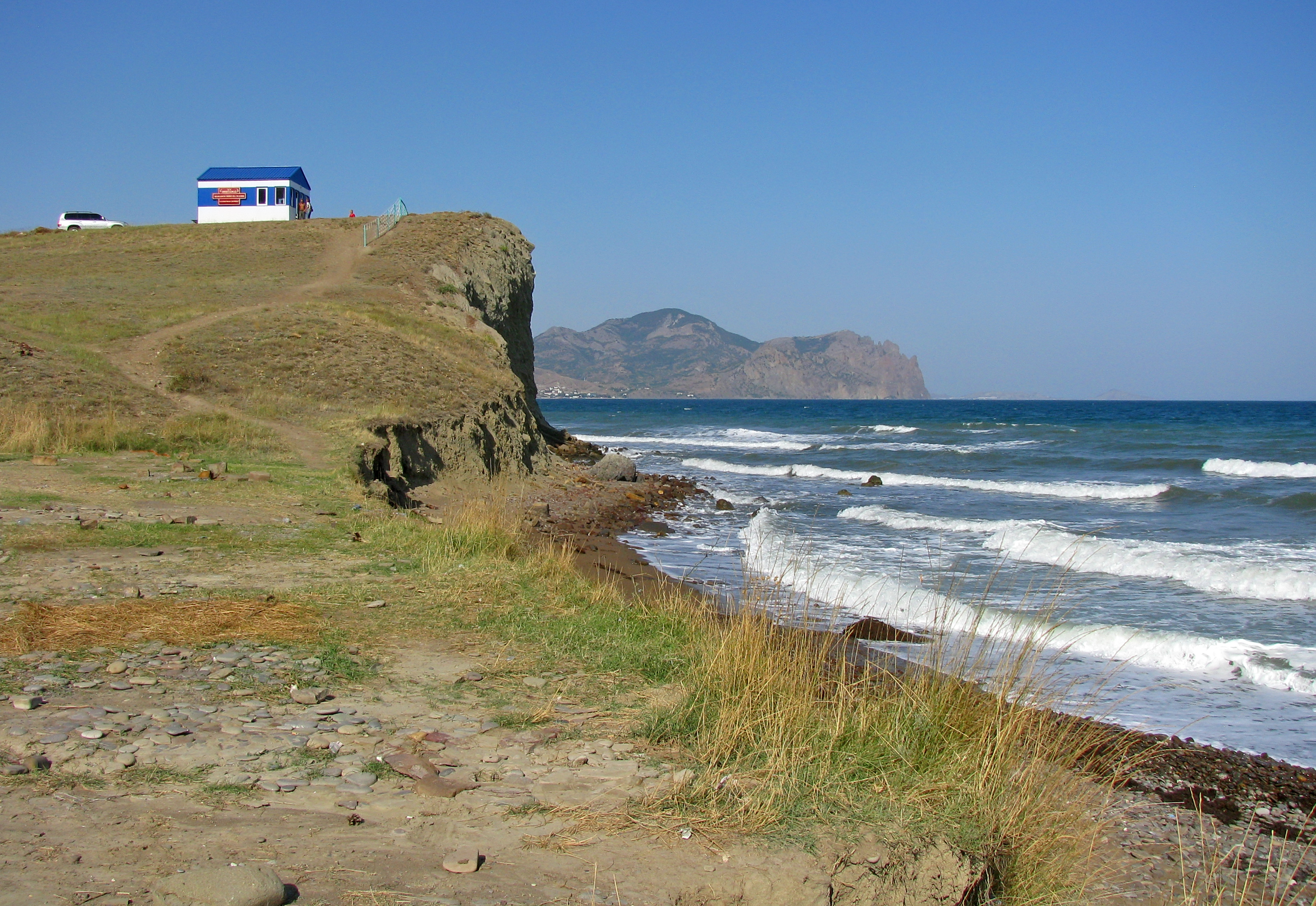 «Лисяча бухта Ечкі-Даг», м. Судак, м. Феодосія